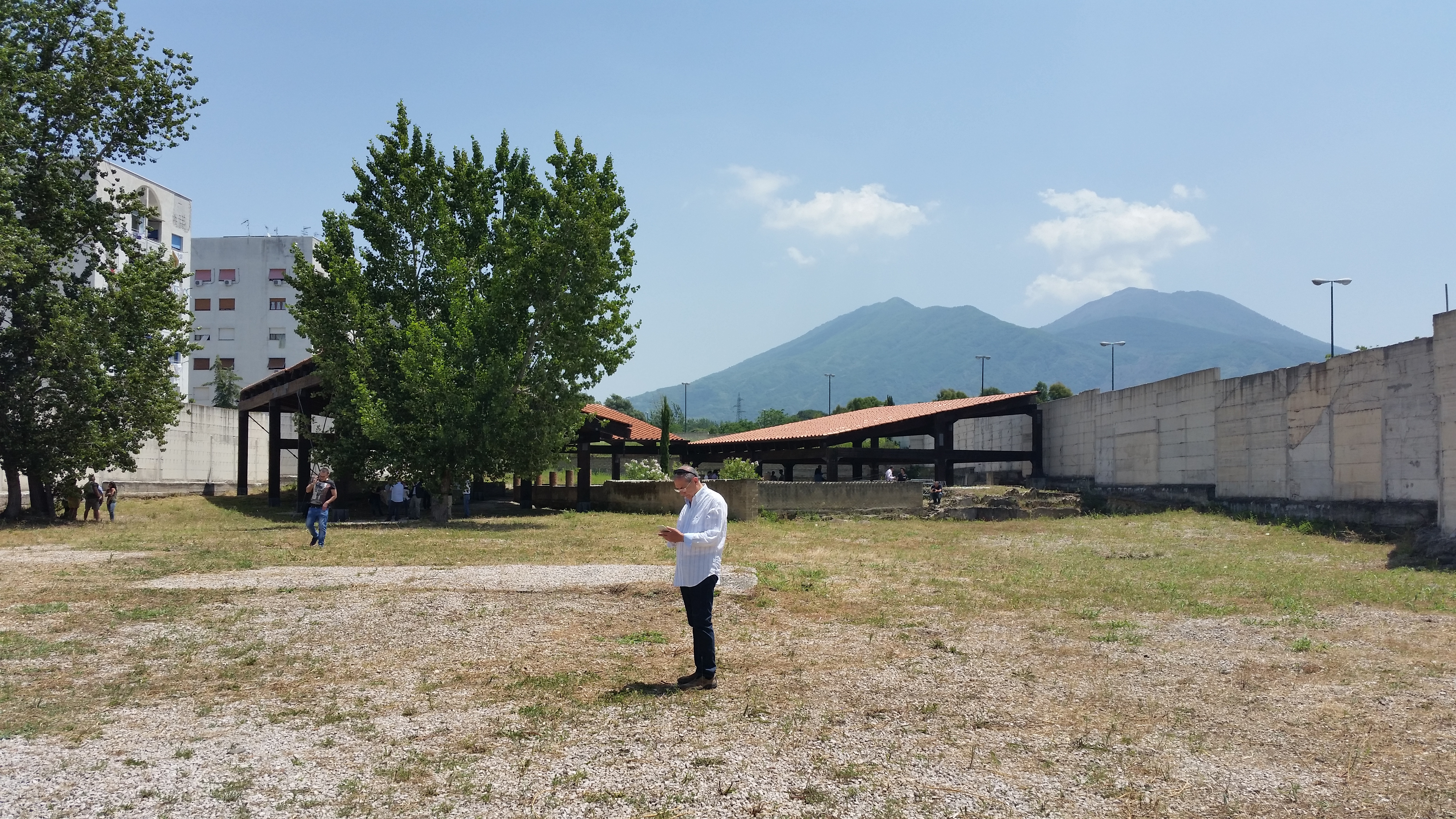 Villa romana nei pressi di Ponticelli!